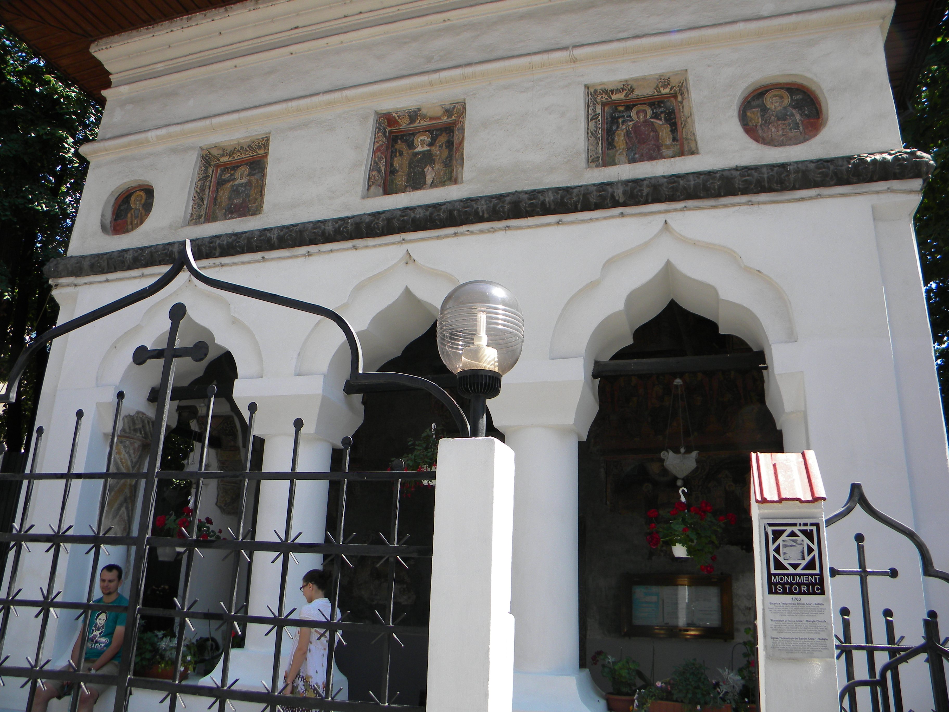 Bucuresti, Romania, Str. Batistei nr. 21 si Str. General Praporgescu David nr. 2; Biserica Adormirea Sfintei Ana; B-II-m-A-18095